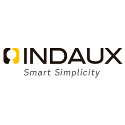 Logo Indaux